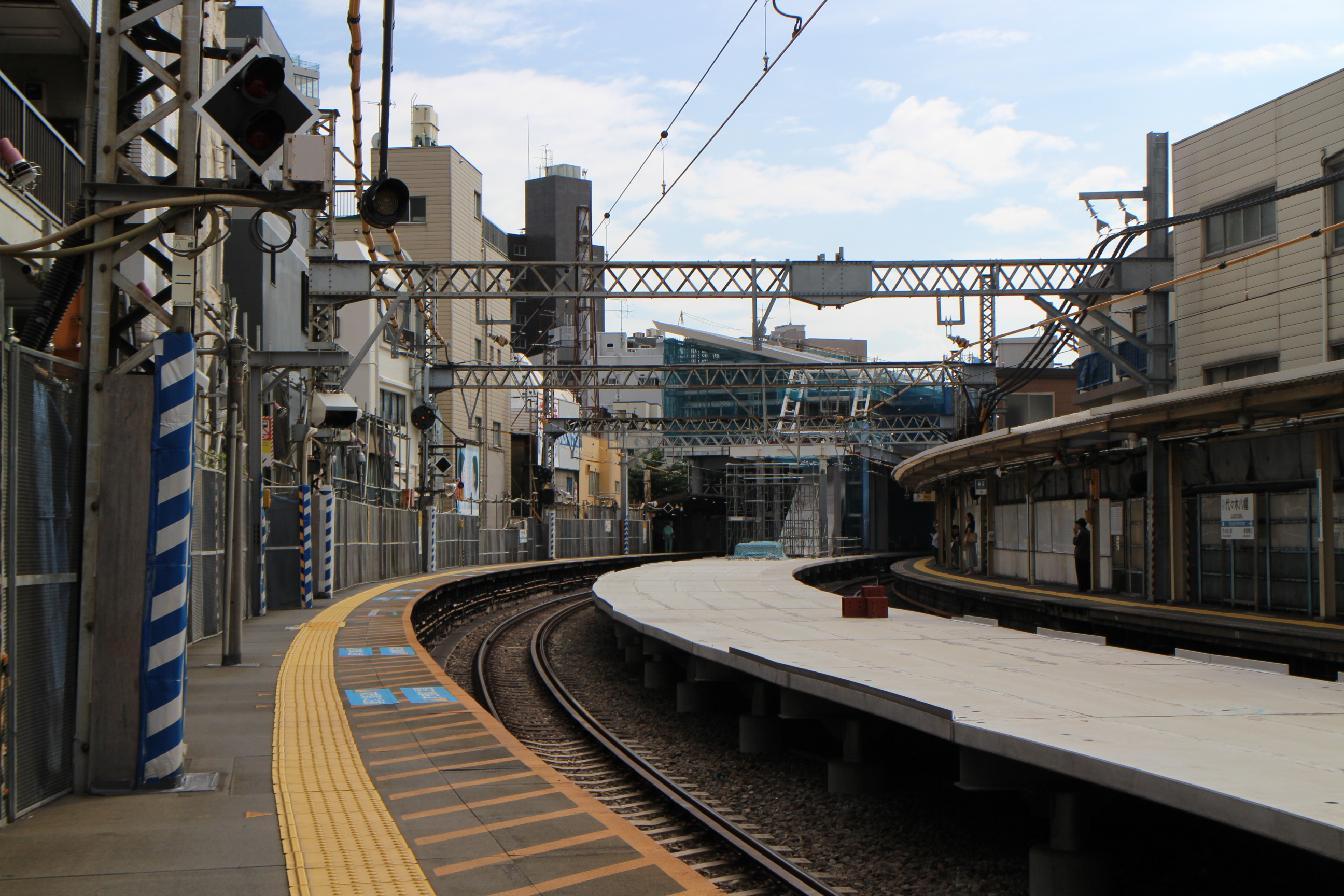 代々木八幡駅ホーム